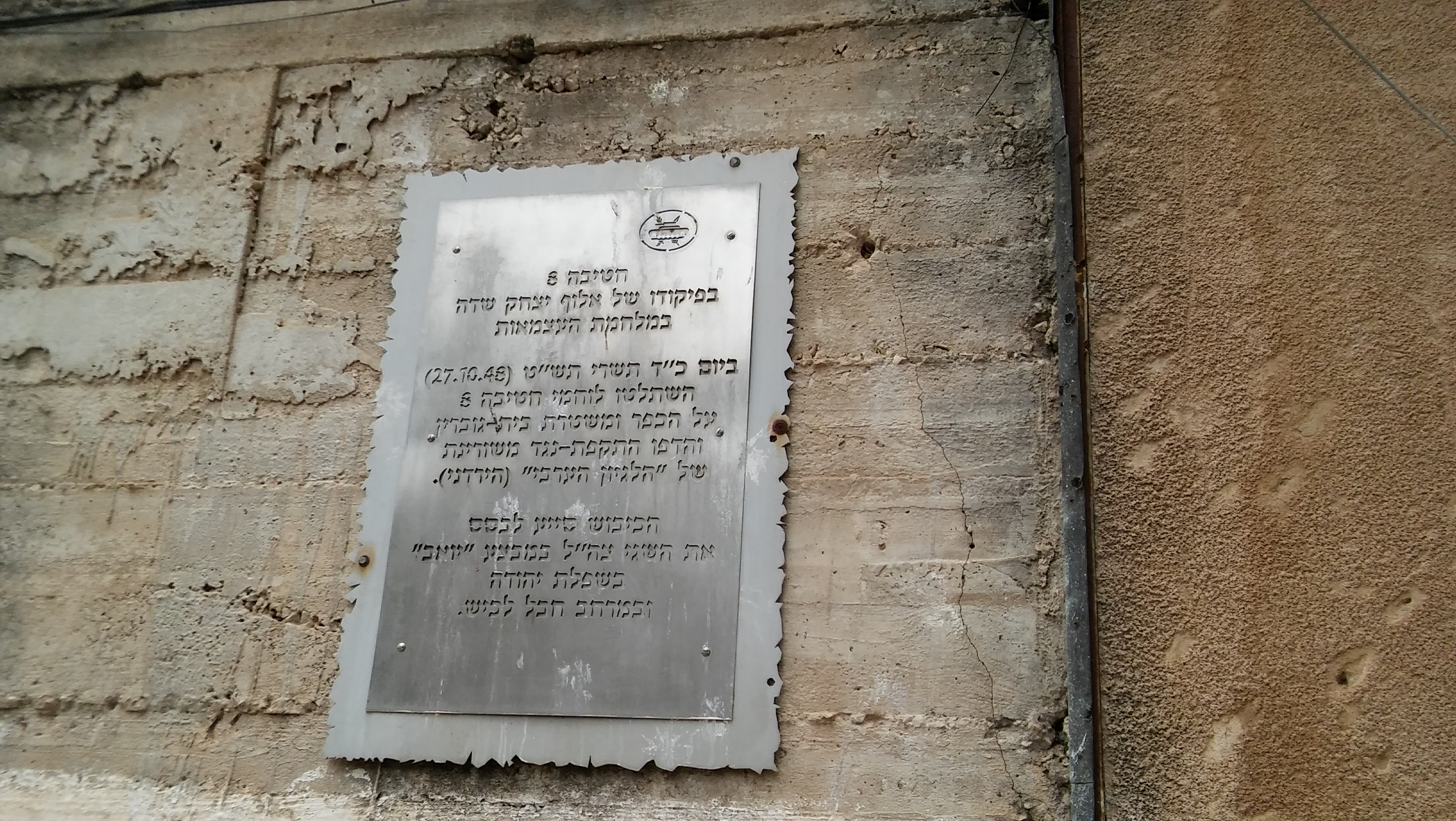 תחנת המשטרה בית גוברין - צד צפוני - לוח זכרון